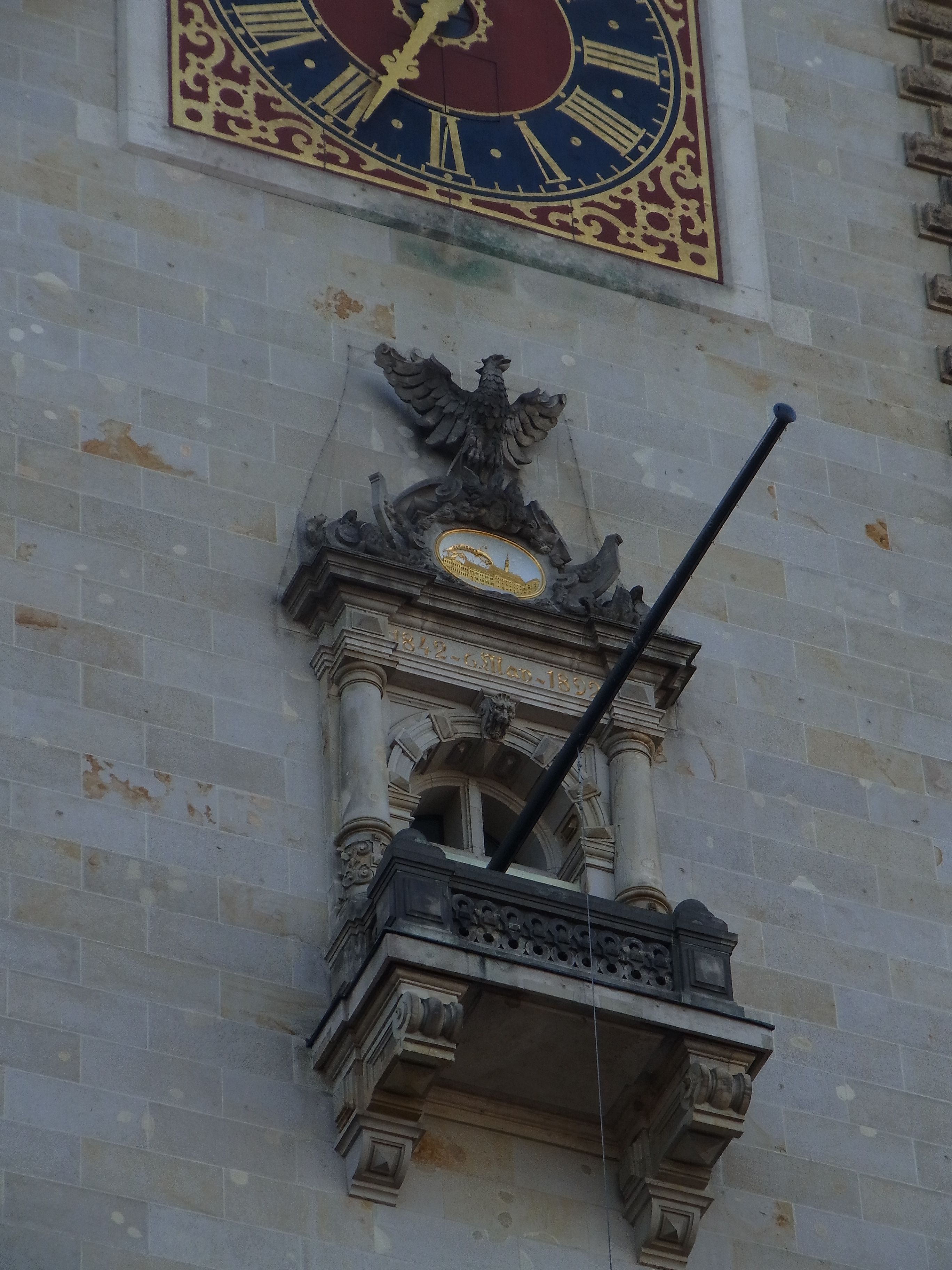 Balkon wie bei alten Rathäusern zur öffentlichen Verlesung der "Burgsprache"